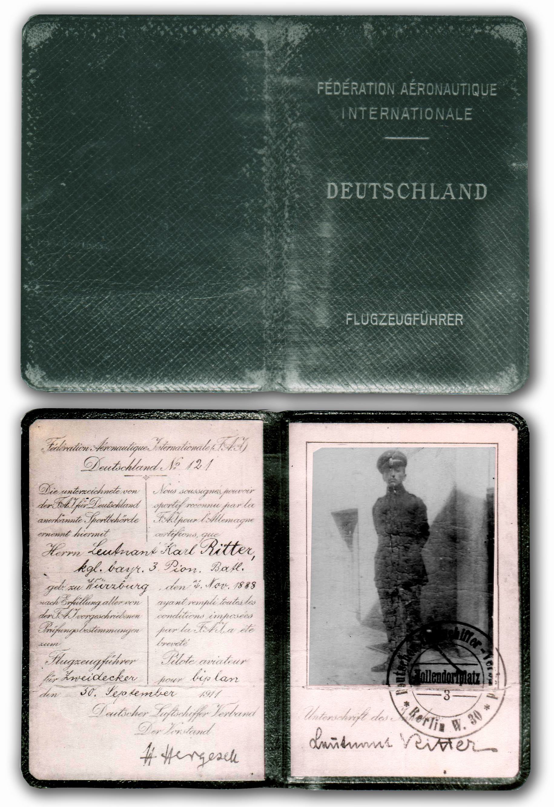 Beschreibung: Flugschein(Pilot licence) Karl Ritters. Als deutscher Pilot Nr. 121, gehörte Ritter zu den "Alten Adler" Quelle: Familienbesitz